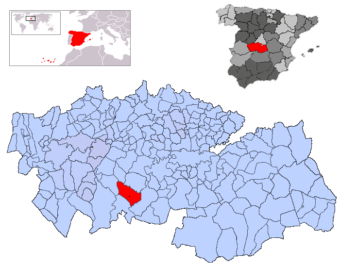 Navahermosa en la provincia de Toledo